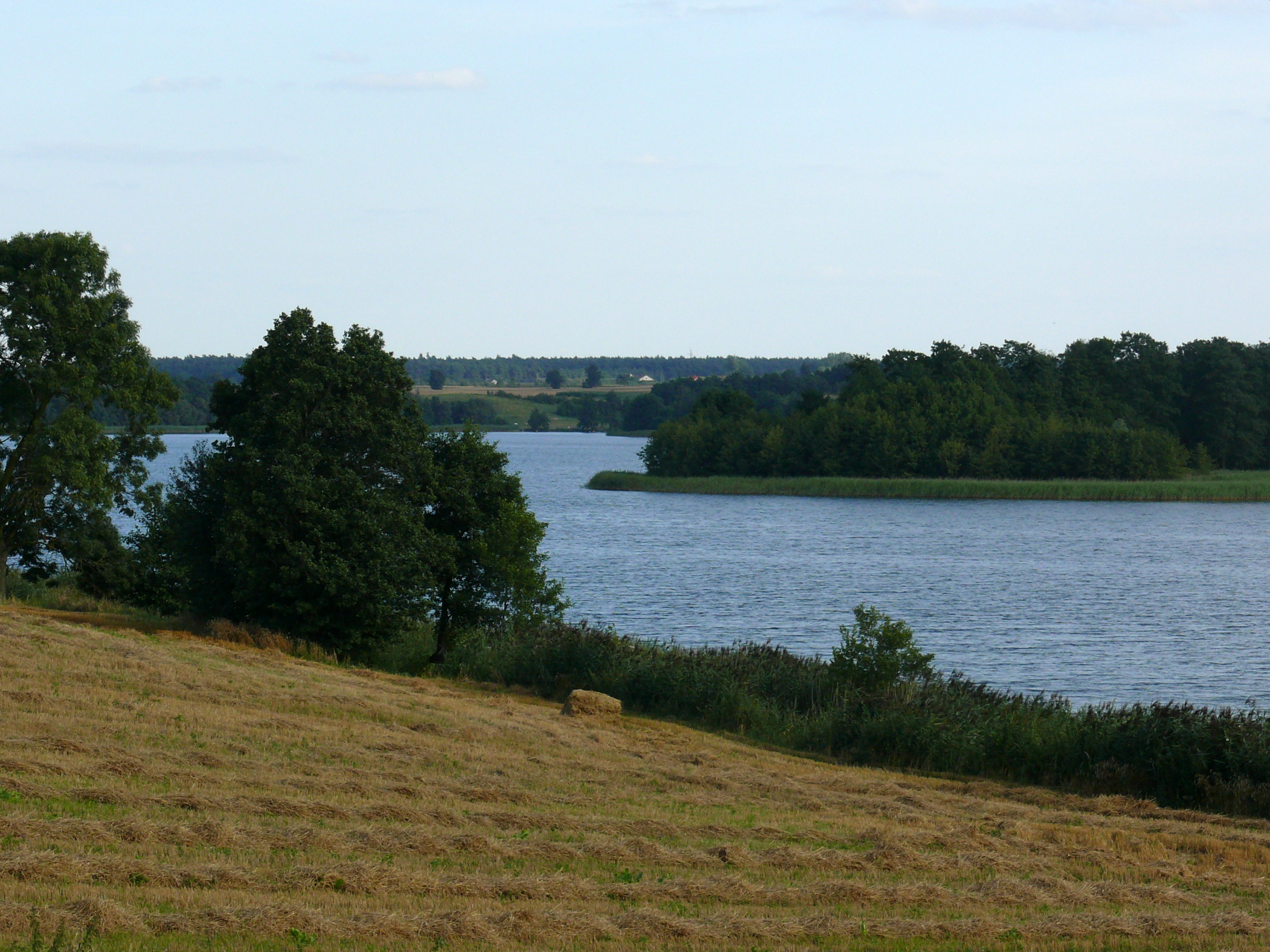 Jezioro Lubotyńskie